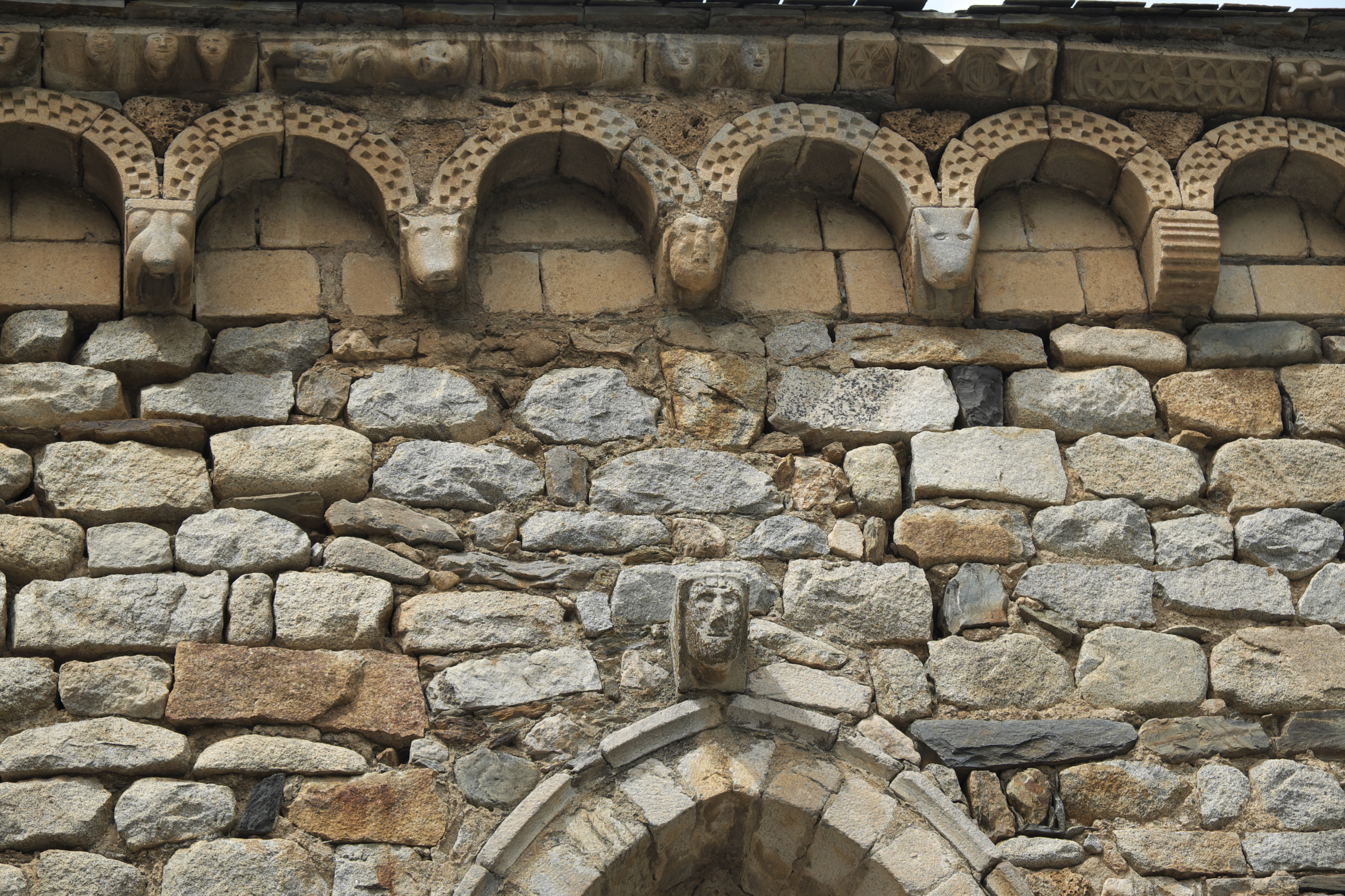 Kirche San Juan in Isil in der Provinz Lerida in Katalonien (Spanien)